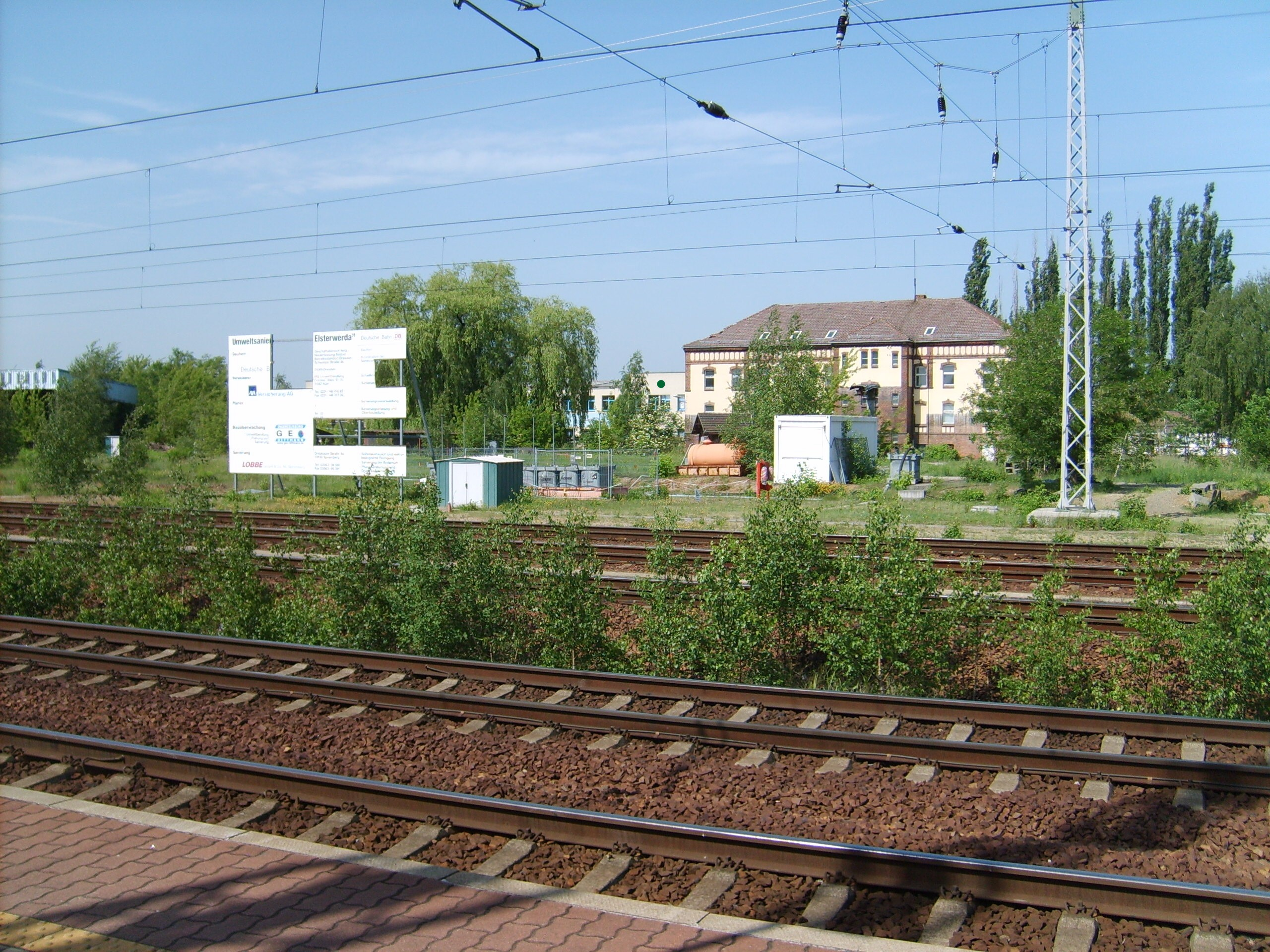 Das Gelände des ehemaligen Bahnbetriebswerks in Elsterwerda